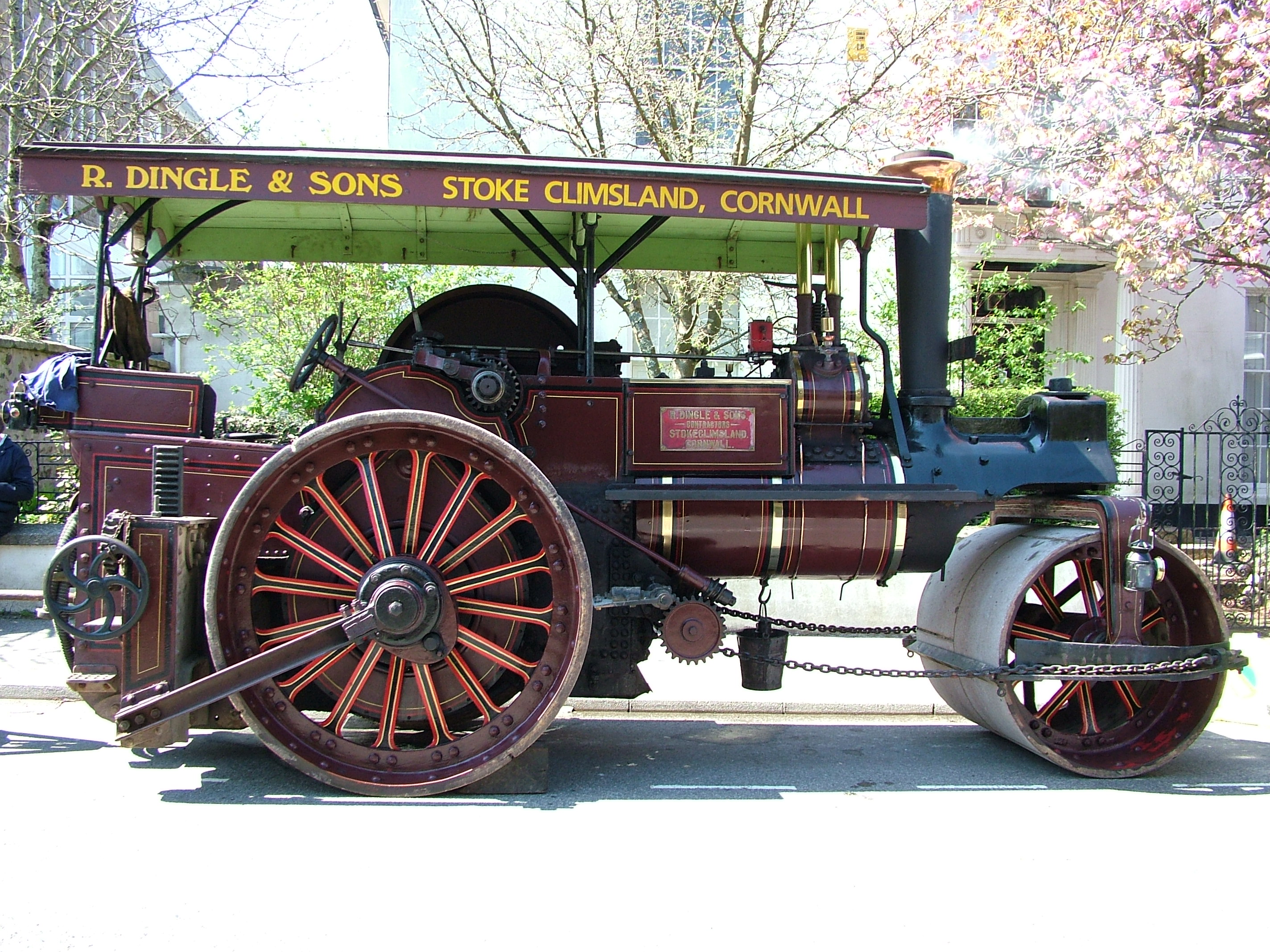 R. Dingle & Sons Steam Engine